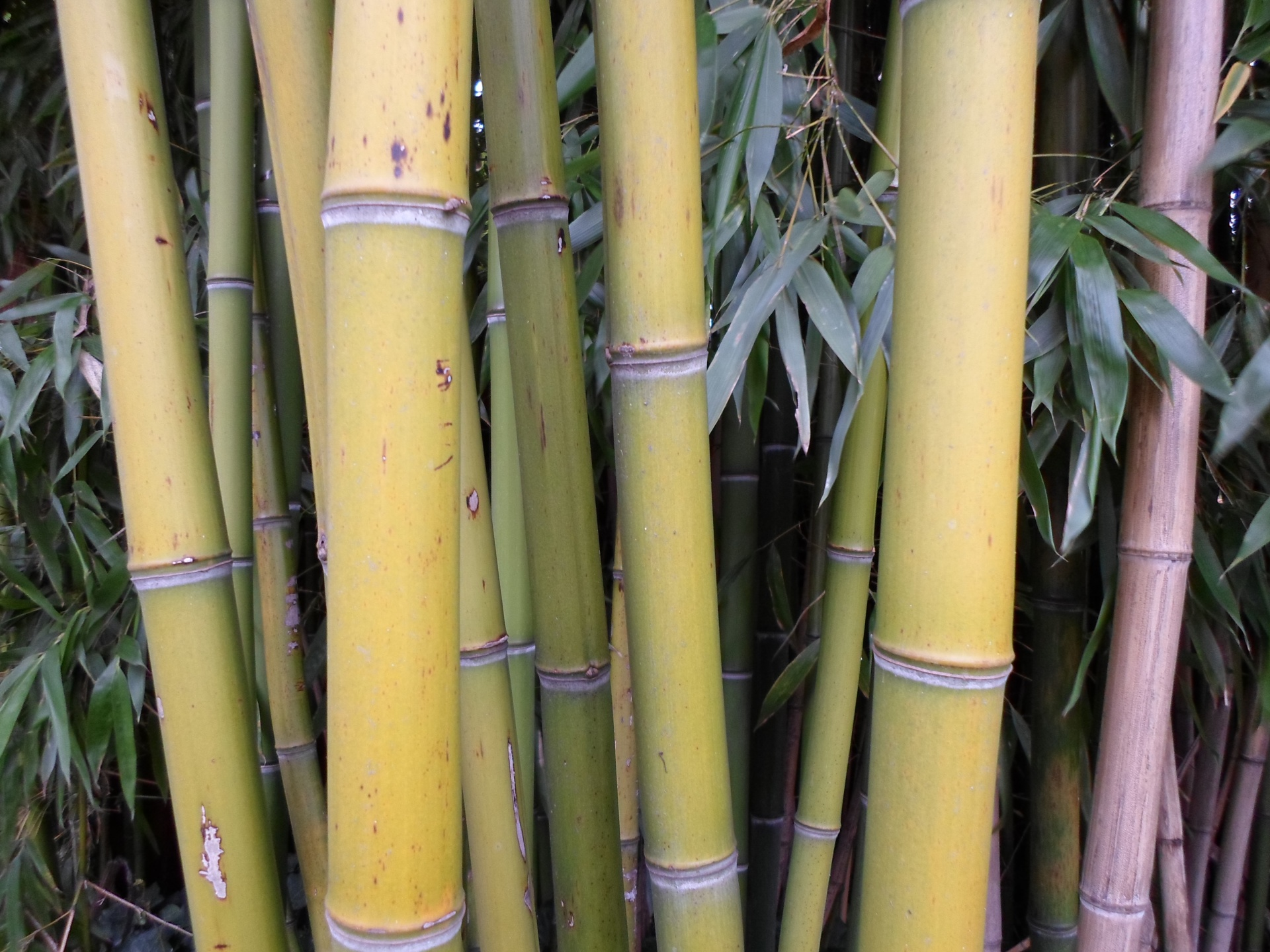 Chaume de bambou bamboo stalk VAN DEN HENDE ALAIN CC BY SA 40 02005